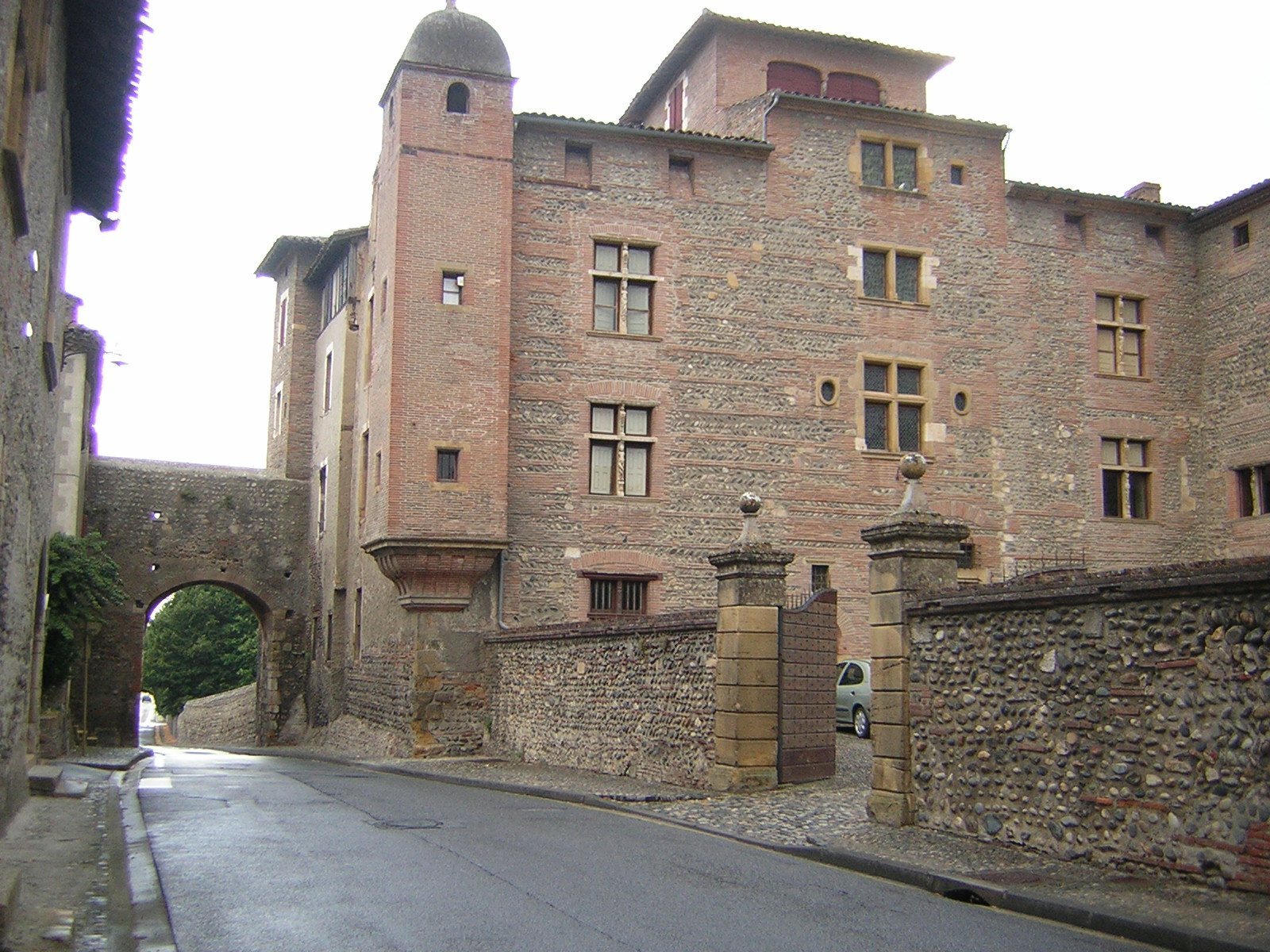 Château de Palaminy (Haute-Garonne, France).